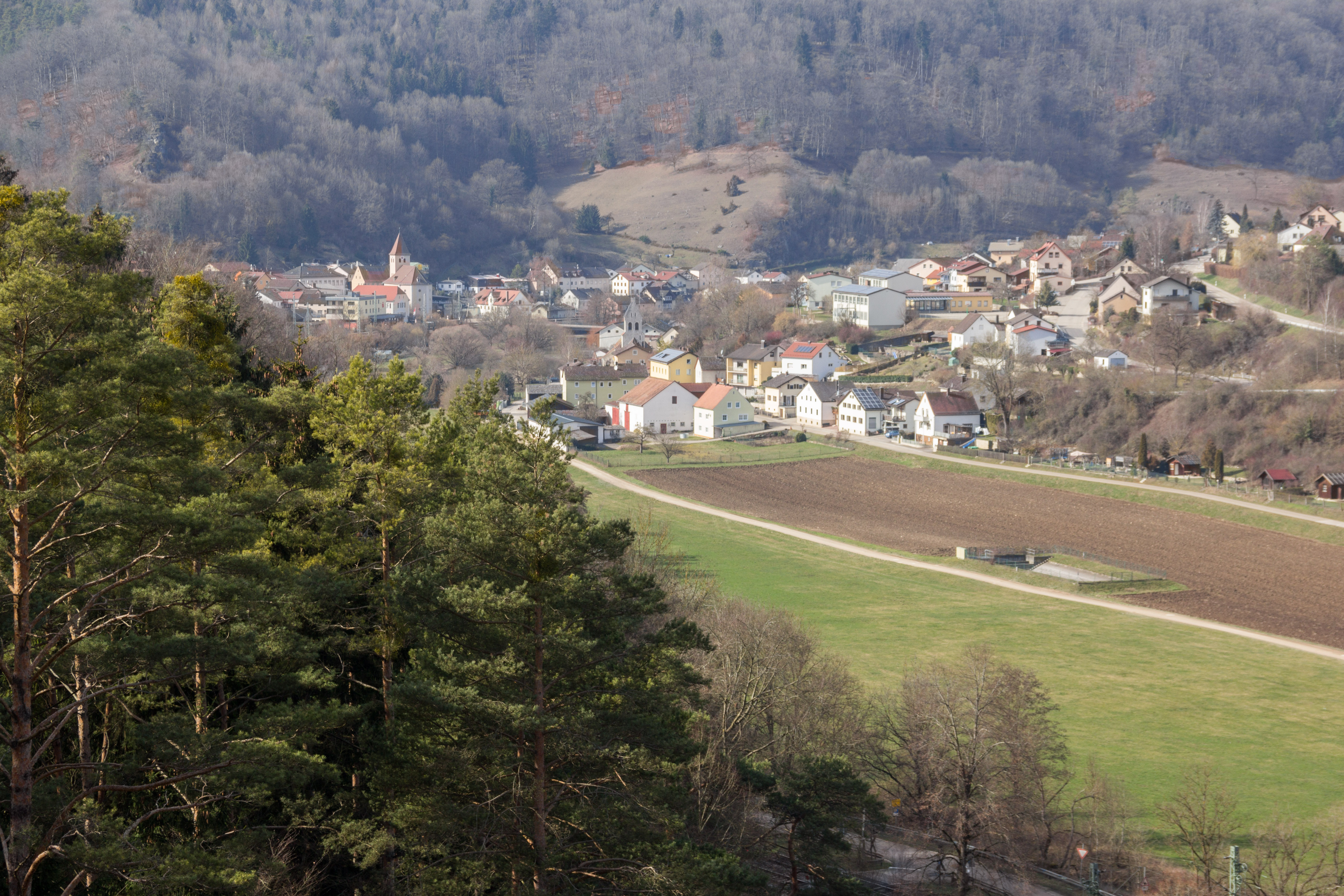 Solnhofen, Ortsansicht